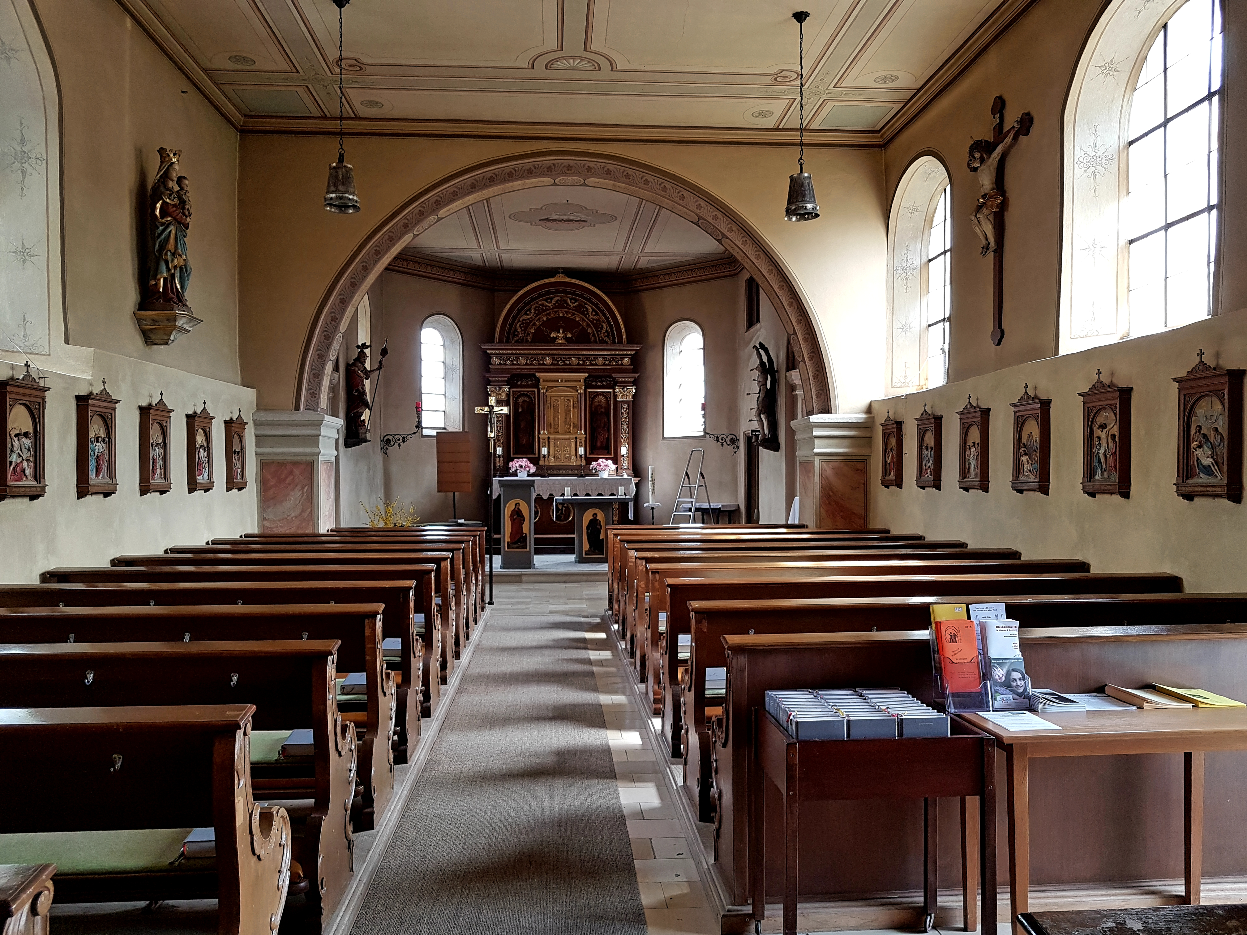 Unterschleissheim, alte Expositurkirche St. Ulrich, der bei den beiden grundlegenden Umgestaltungen (1856 + 1893) entstandene Innenraum, der eine Verschmelzungs-Mixtur von Neobarock, Neorenaissance, Neoromanisch und Nazarenerstil darstellt.